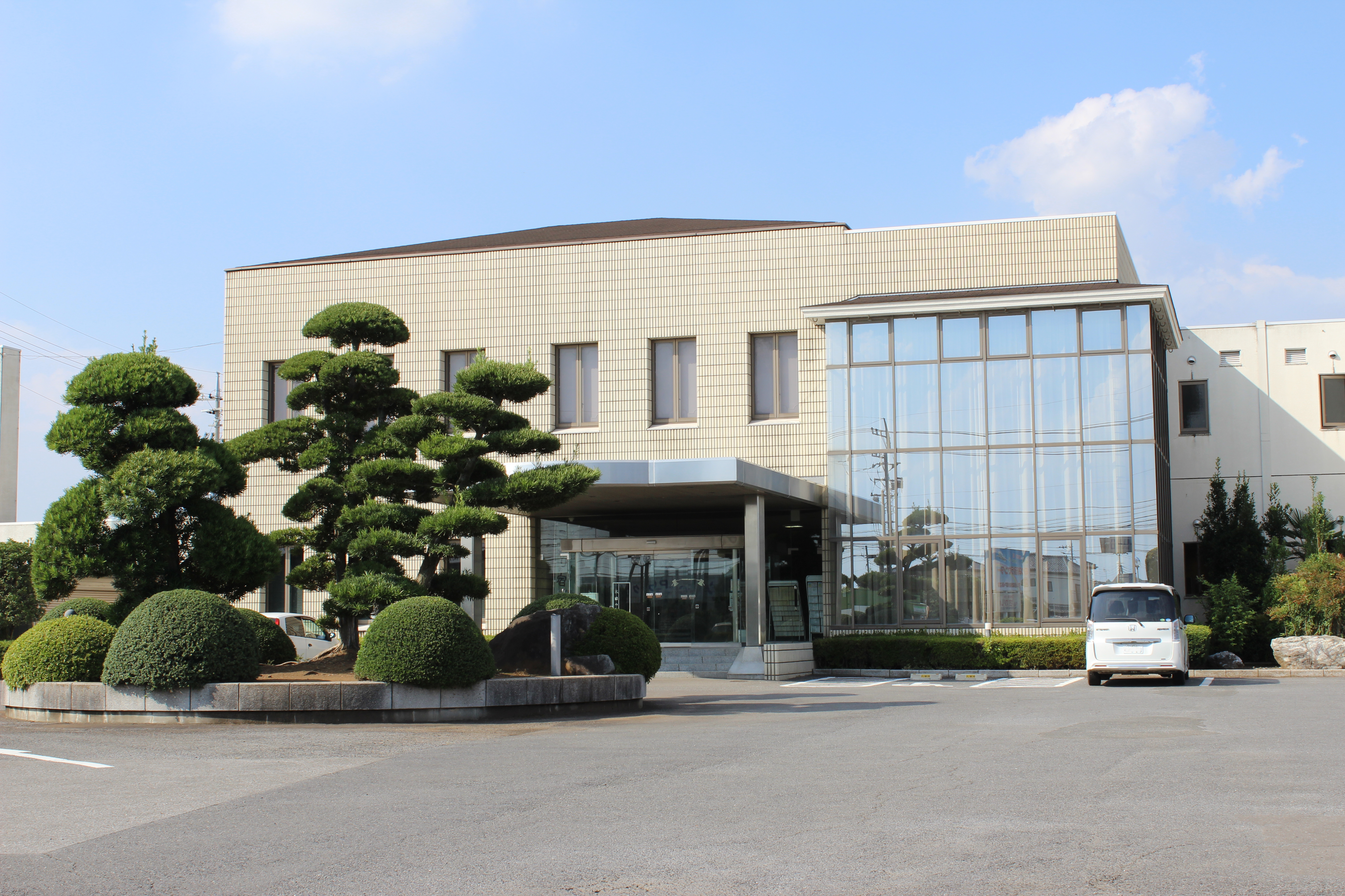 JA茨城むつみ本店（茨城県猿島郡境町長井戸23、ナンバープレート加工）